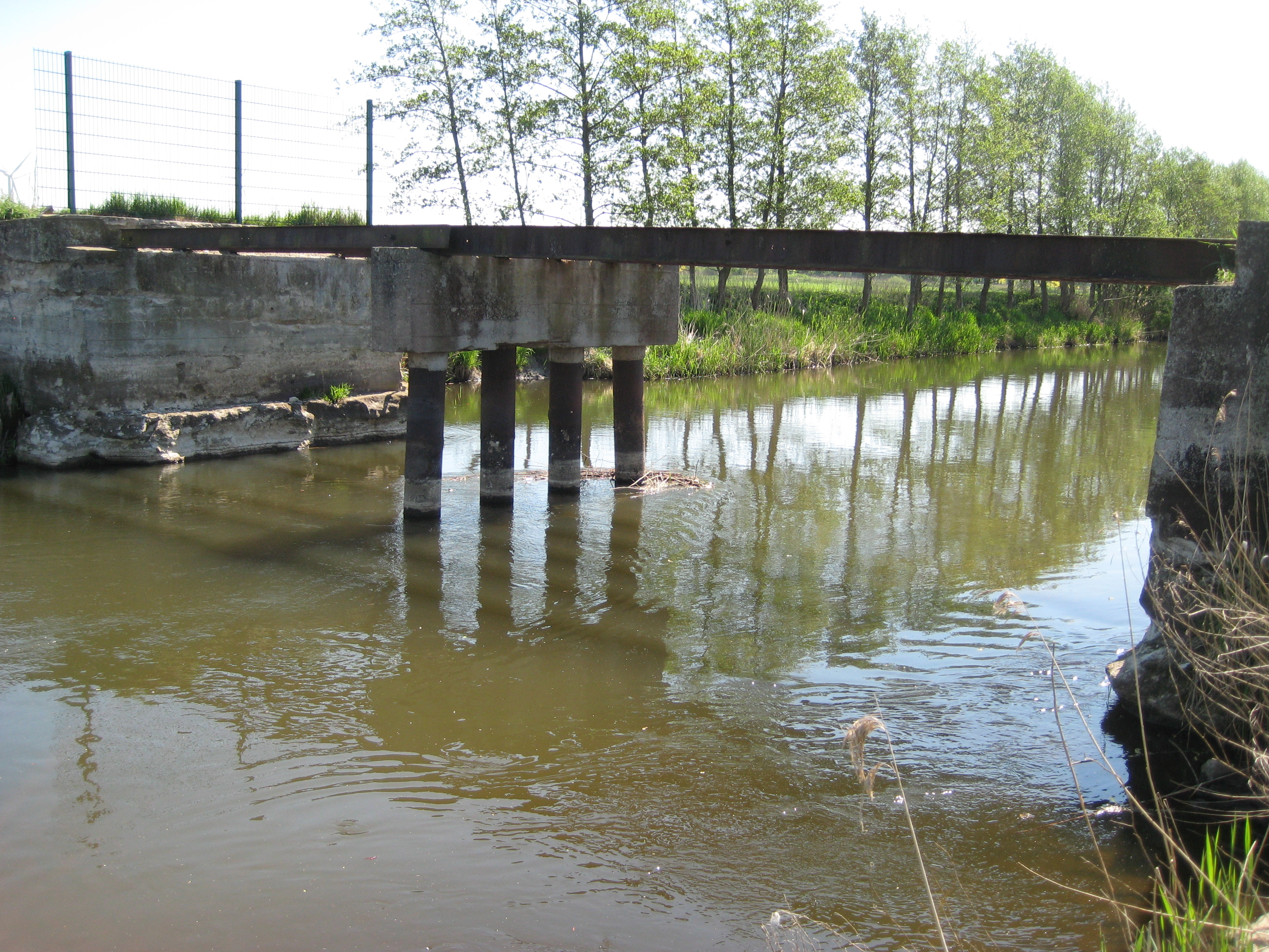 Der Fluss Ucker führt an Schönwerder vorbei